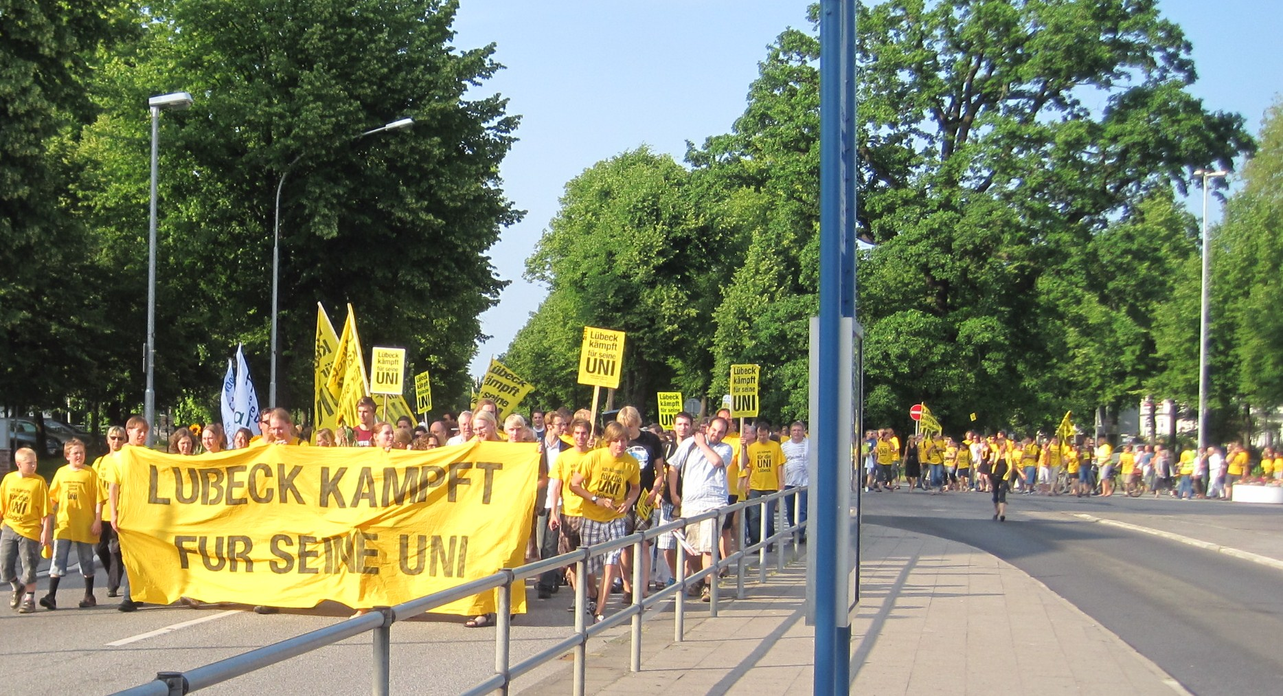 Lübeck kämpft für seine Uni. Sternmarsch am 1. Juli 2010.